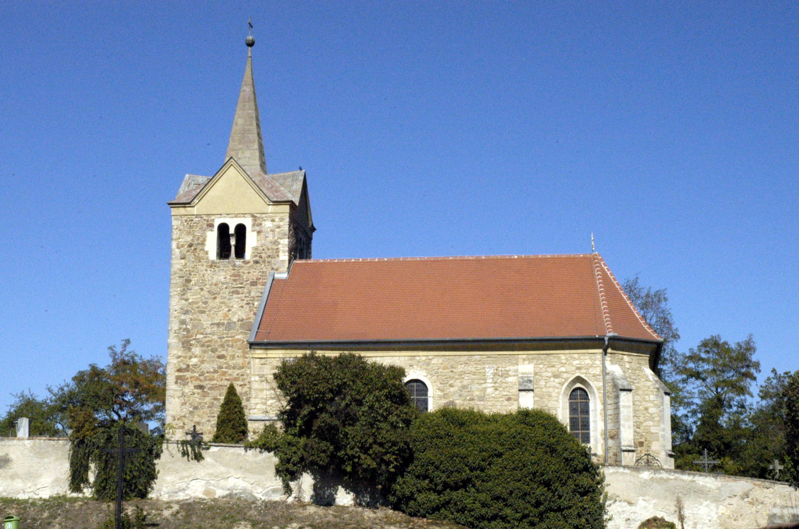 katholische Filialkirche heiliger Jakob in Limberg, Gemeinde Maissau